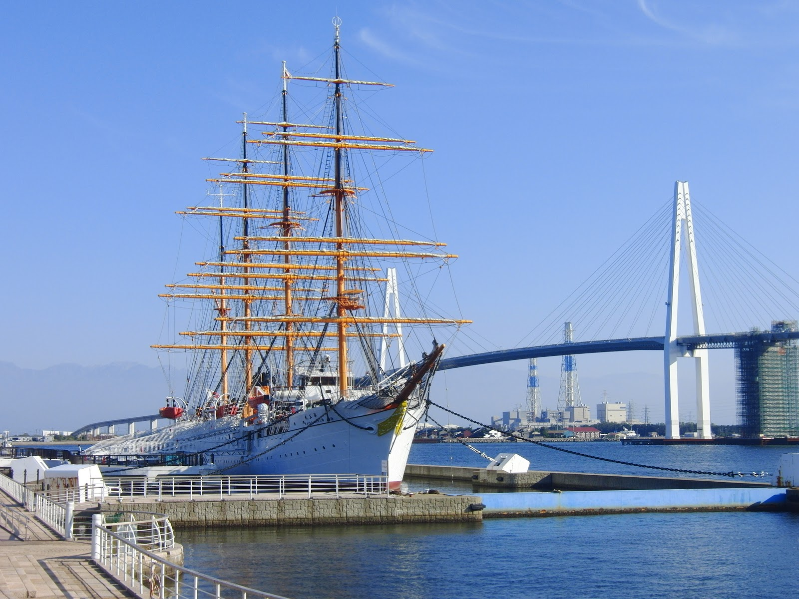 富山新港 海王丸パーク 海王丸と新湊大橋